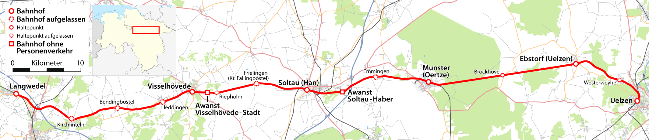 DB Netz AG - Kursbuchstrecke 116 Langwedel-Uelzen (Amerika-Linie). Stand: Dezember 2011.